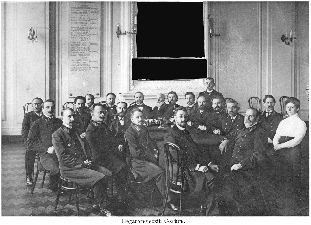 Педагогический совет гимназии им. Г. Шелапутина в 1910/1911